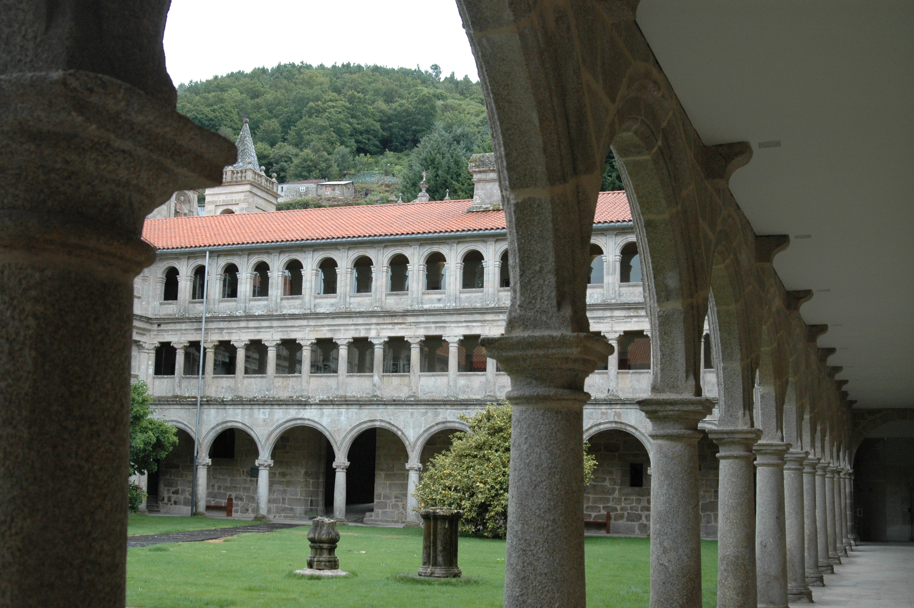 Parador Santo Estevo, Luíntra, Nogueira de Ramuín, Ourense